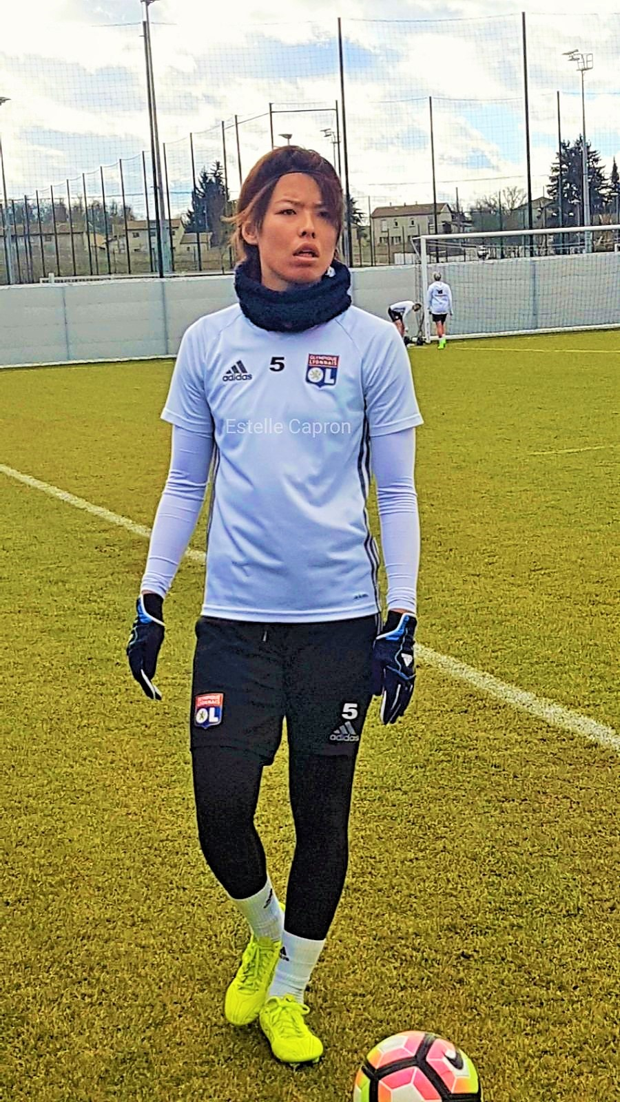 Saki Kumagai (熊谷紗希) à l'entraînement avec l'Olympique lyonnais en 2017.